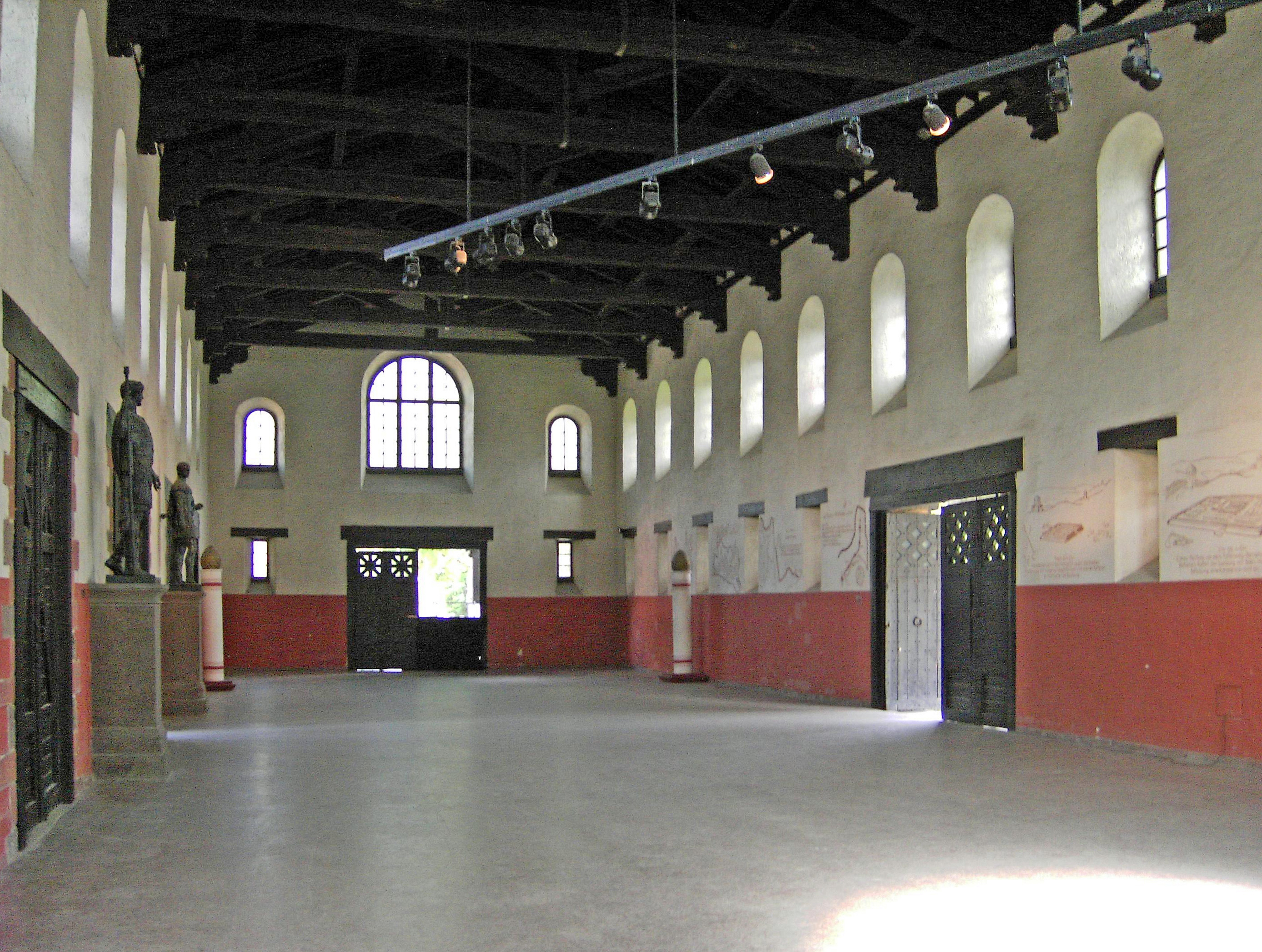 Innenansicht der Basilica (Vorhalle) zu den Principia (Stabsgebäude) in der Saalburg. Die Halle lag am Treffpunkt der Achsen zwischen den vier Kastelltoren. Sie diente als Appell-und Übungshalle. Die beiden seitlichen Tore führten zu der Porta Principalis Dextra bzw. Sinistra, das Tor an der rechten Stirnseite zur Porta Praetoria. Das Tor auf der linken Stirnseite führte zum Porticus und Innenhof der Principia.